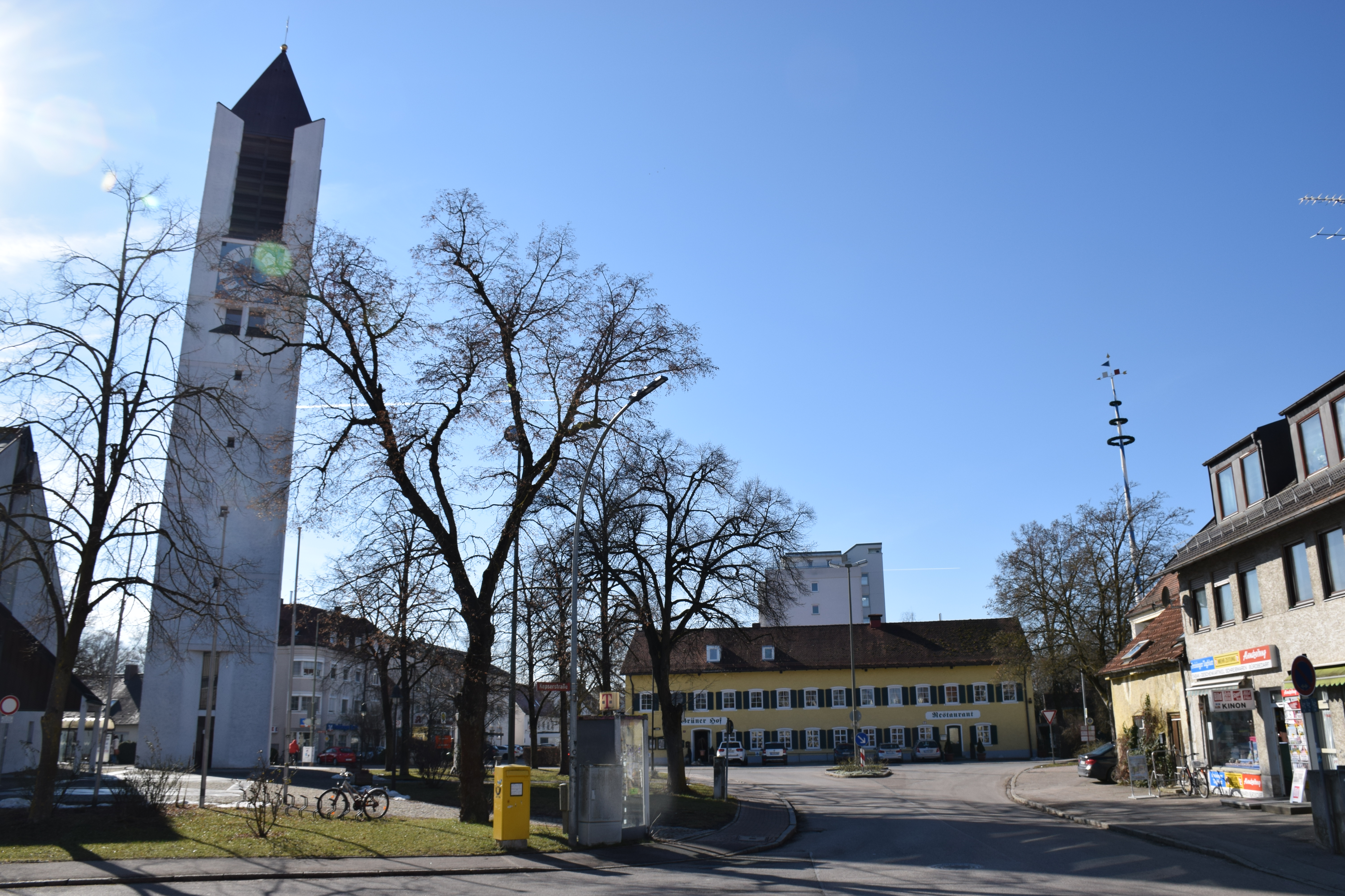 Das Zentrum des Freisinger Stadtteils Lerchenfeld - hier betrachtet von der Kulturstraße aus - wird dominiert vom Turm der katholischen Pfarrkirche St. Lantpert. Im Hintergrund ist die Fassade des Gasthauses "Grüner Hof" zu sehen, dahinter ein mehrstöckiges Wohnhaus am Rabenweg.